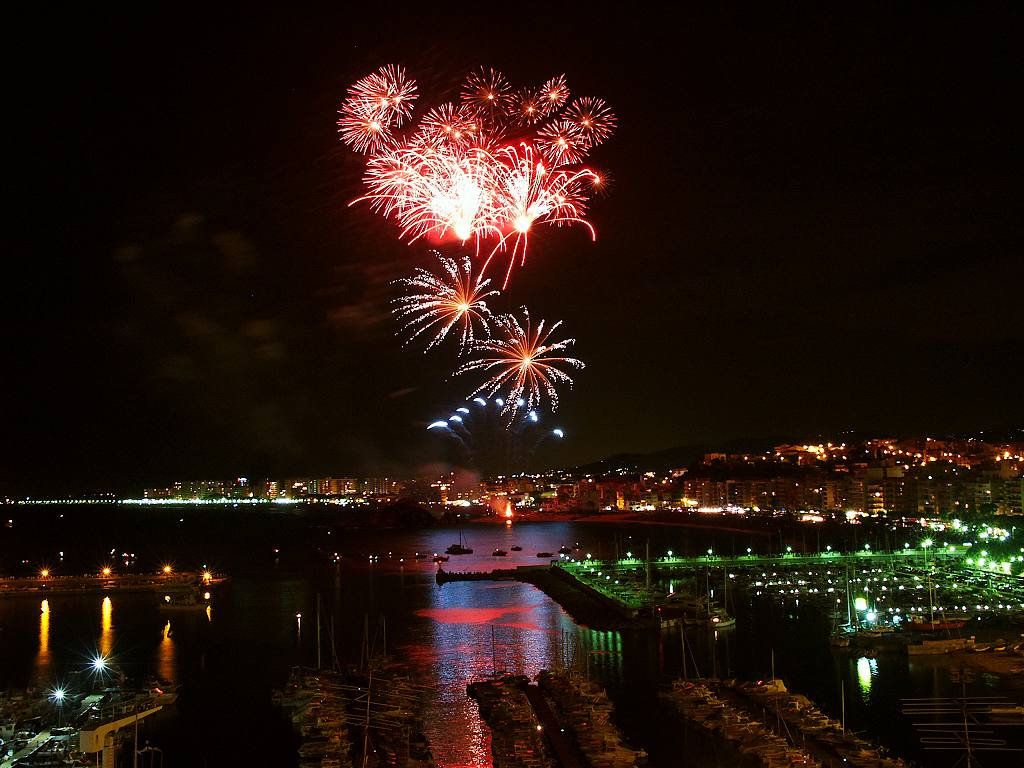 Descripción: Fuegos artificiales de Blanes Fecha: 27/07/2003 Hora: 22:32 Cámara: DiMAGE 7Hi ISO: 100 Tv: 4 Av: 5.6 Autor: aTarom